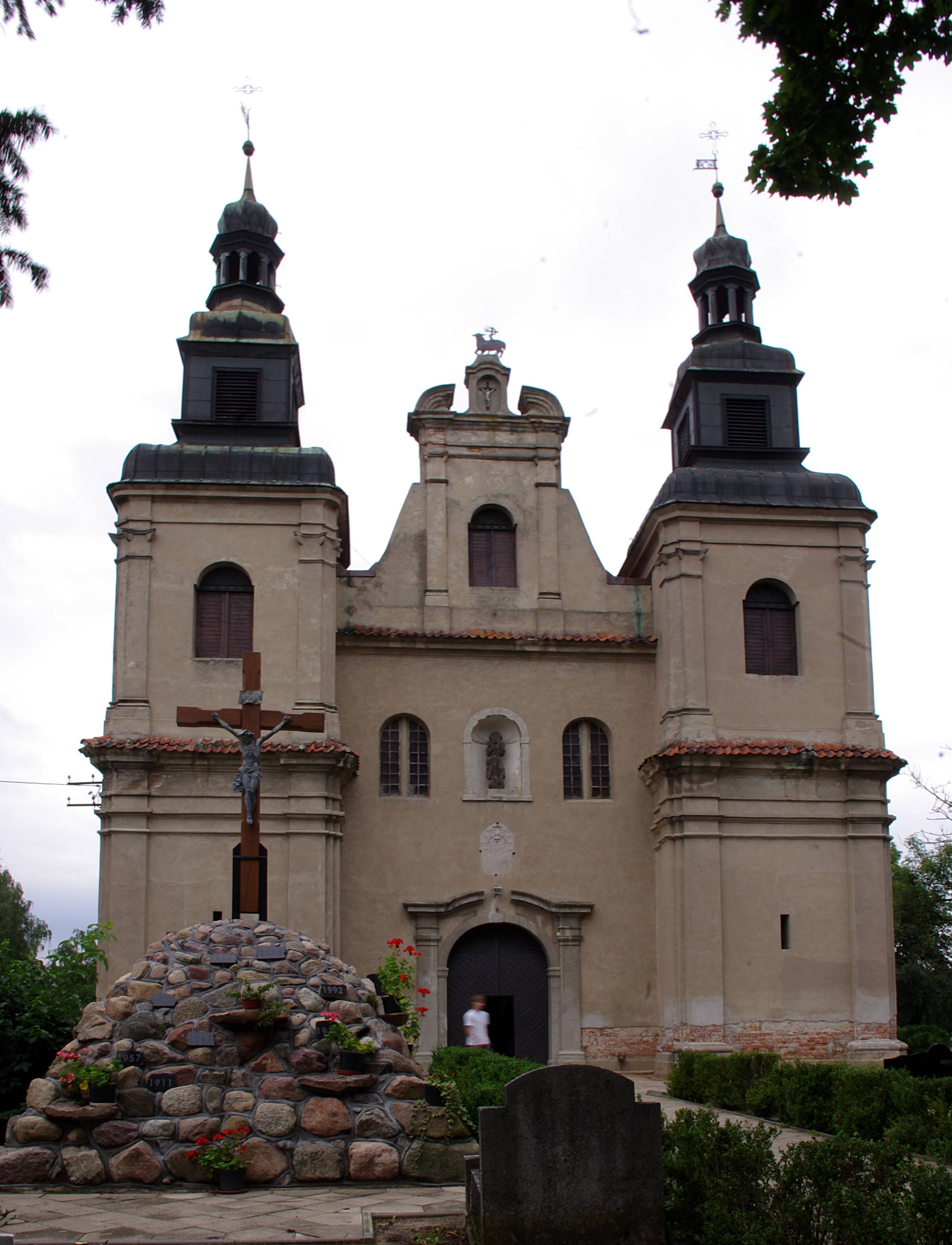 Starogród, kościół par. p.w. św. Barbary, 1754